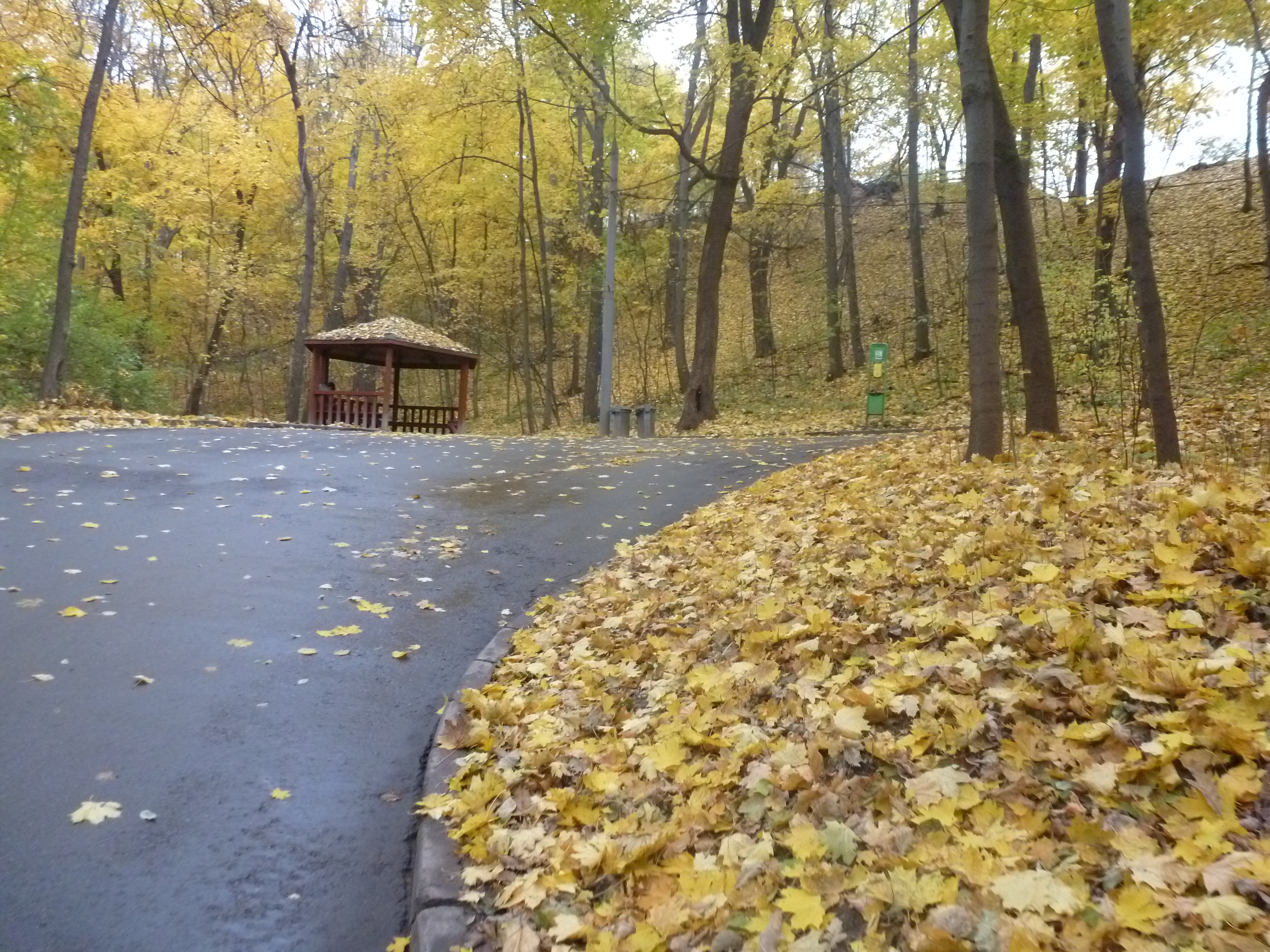 Parko "Montoj Vorobjovi", Moskvo